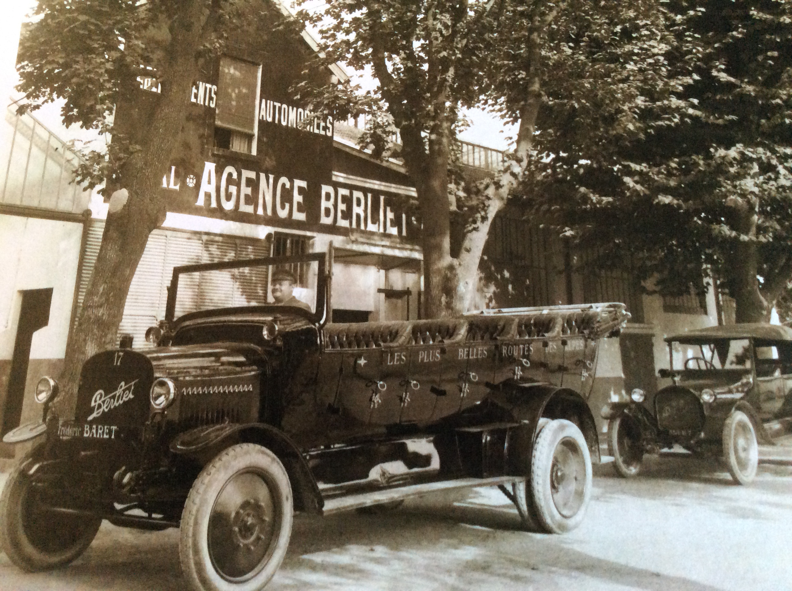 transport Baret sur l'esplanade de Grenoble. Année de la photo 1921 Les transports F. Baret desservaient la Chartreuse mais également Cannes et la Riviera le slogan était « Les plus belles routes des Alpes » Un exemplaire d’un char à Banc 1 CB Berliet appartenant à la flotte de F Baret est exposé à la Fondation Berliet de Lyon.